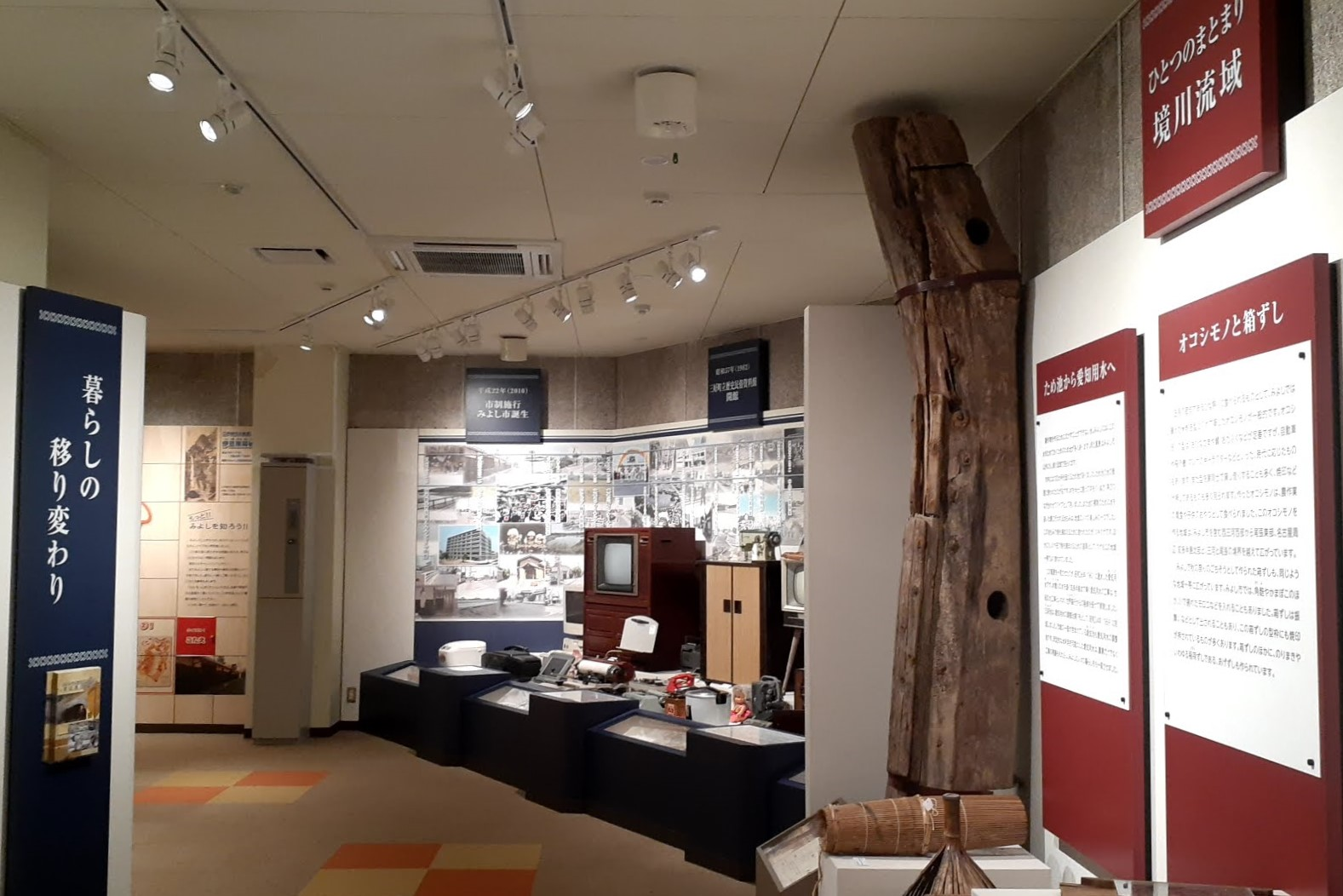 愛知県みよし市三好町陣取山44-1にあるみよし市立歴史民俗資料館。